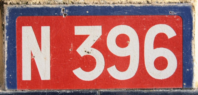 Cartouche de panneau Nationale 396